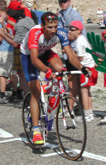 David Moncoutie. Tour de France 2002, Mont Ventoux